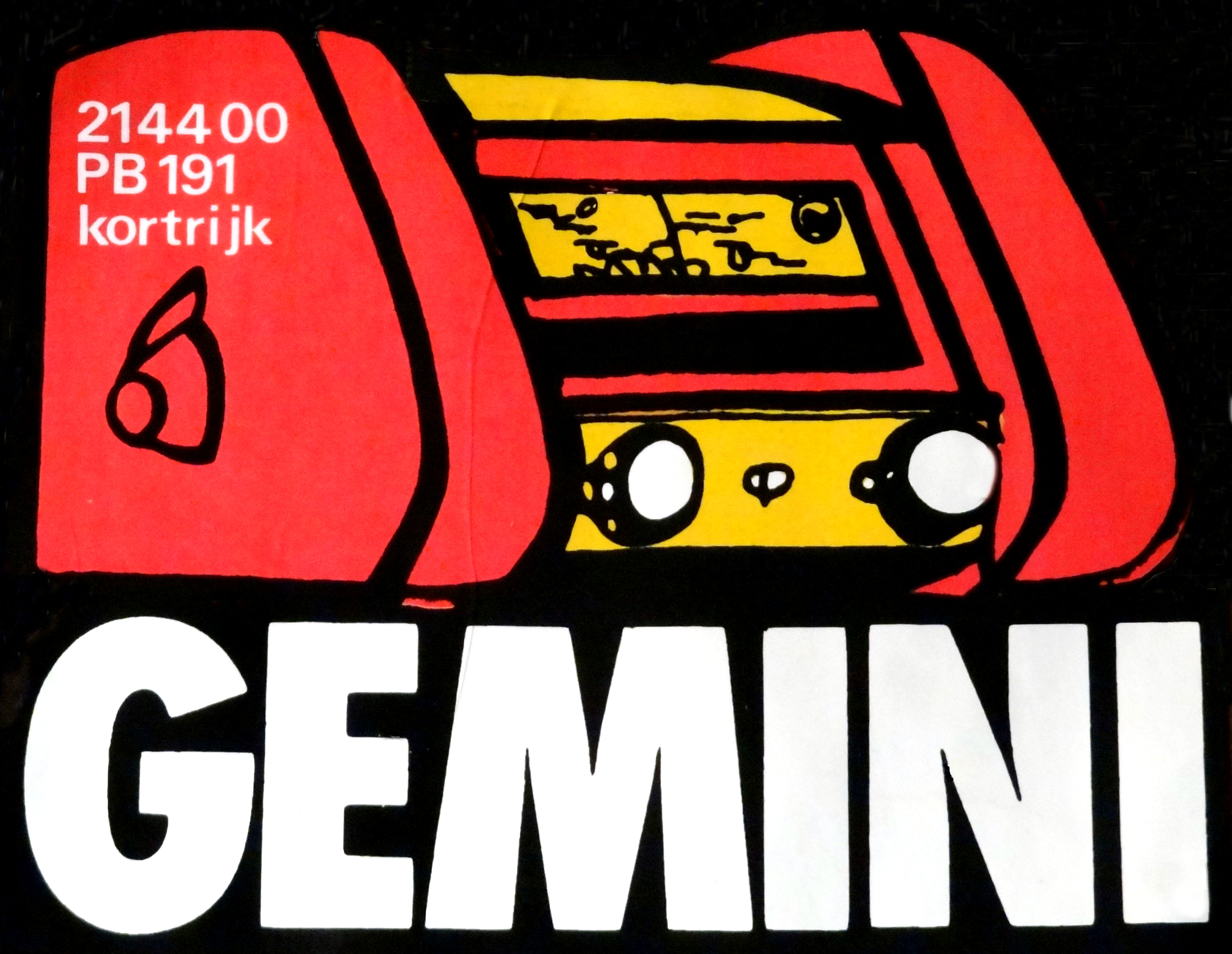 De bekendste zelfklever van Radio Gemini rond 1980